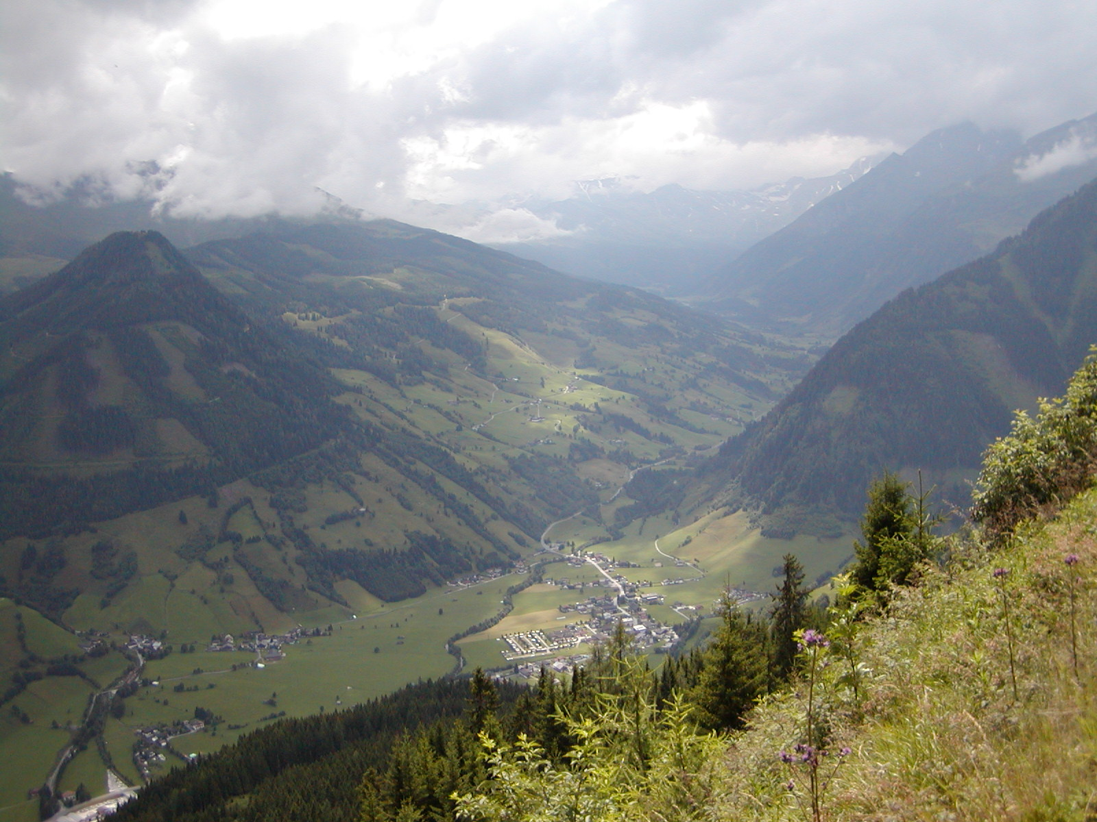 Blick ins Raurisertal, Salzburger Land, Österreich; aufgenommen am 15.7.2002 auf dem Waldlehrpfad, Viertelstunde bergabwärts von der Aussichtsplattform